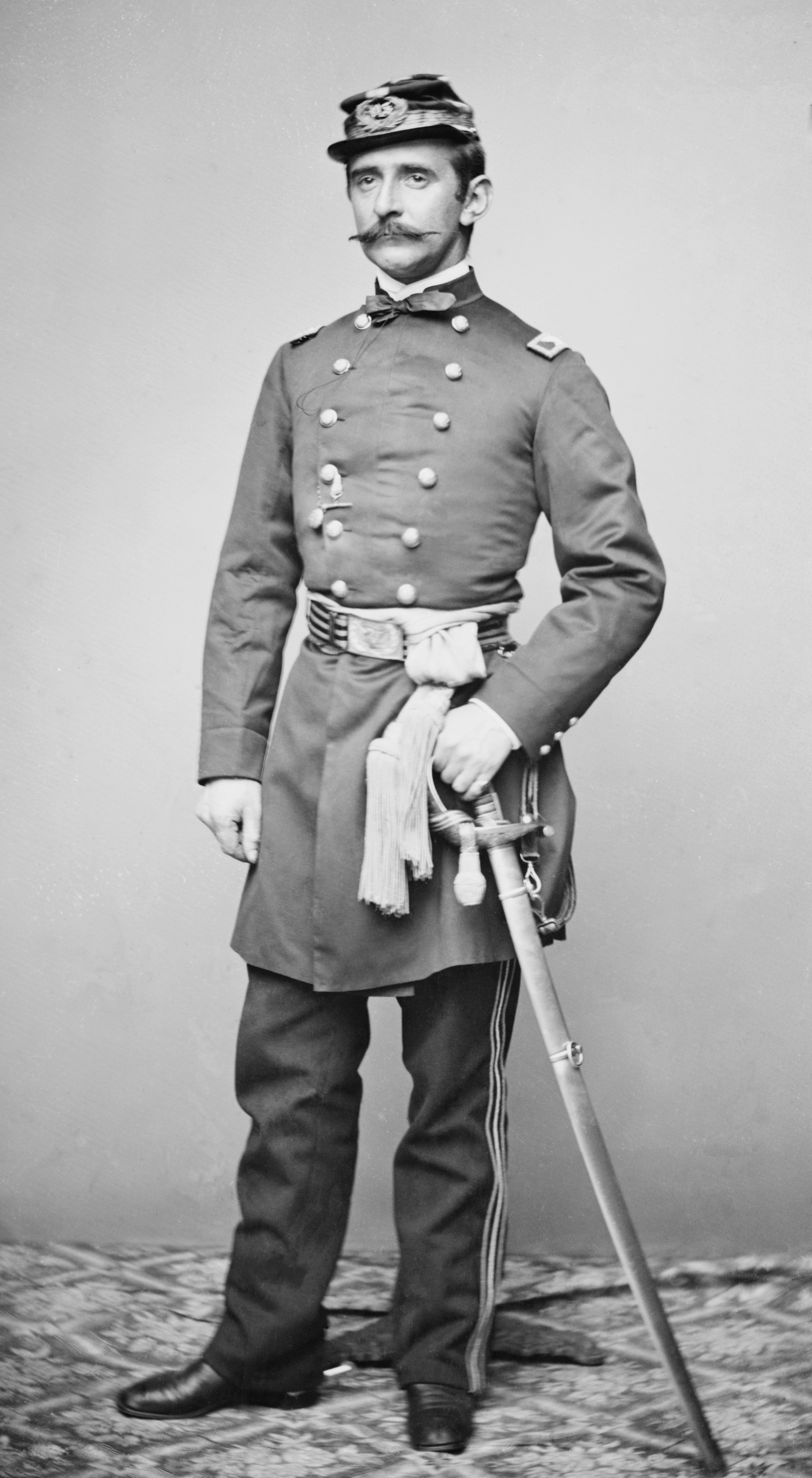 Felix Salm-Salm (1828–1870). Library of Congress description: "Capt. Felix Salm Salm"